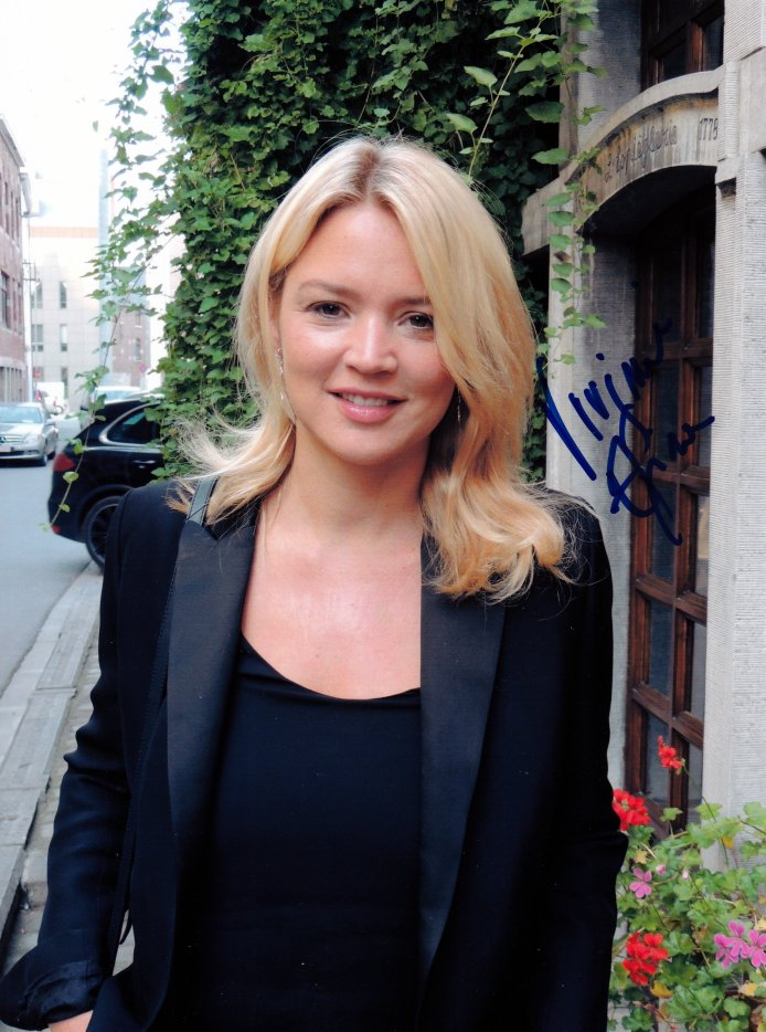 Autographe de Virginie Efira. Prise de vue vers 2012 ou 2013.